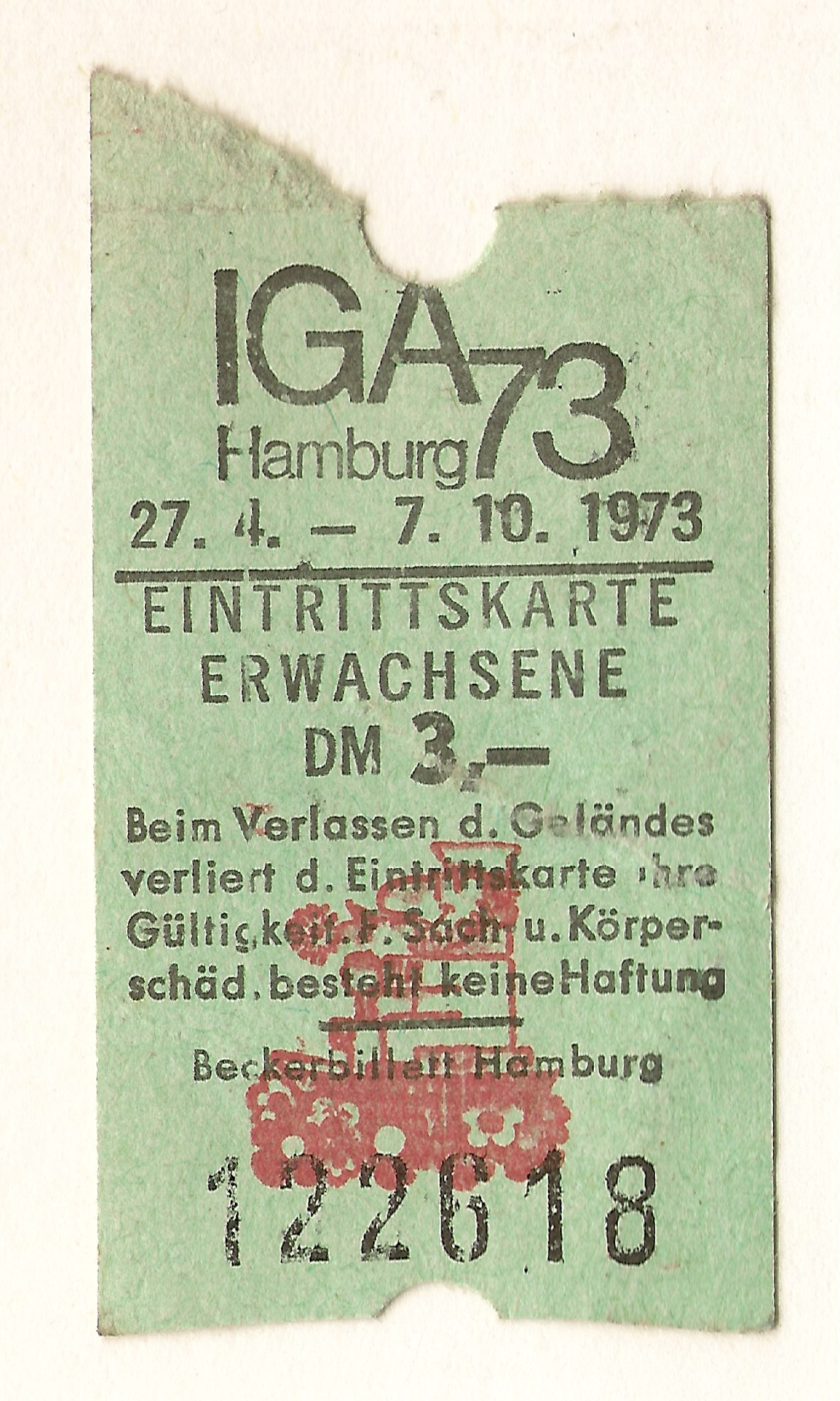 Germany — Hamburg